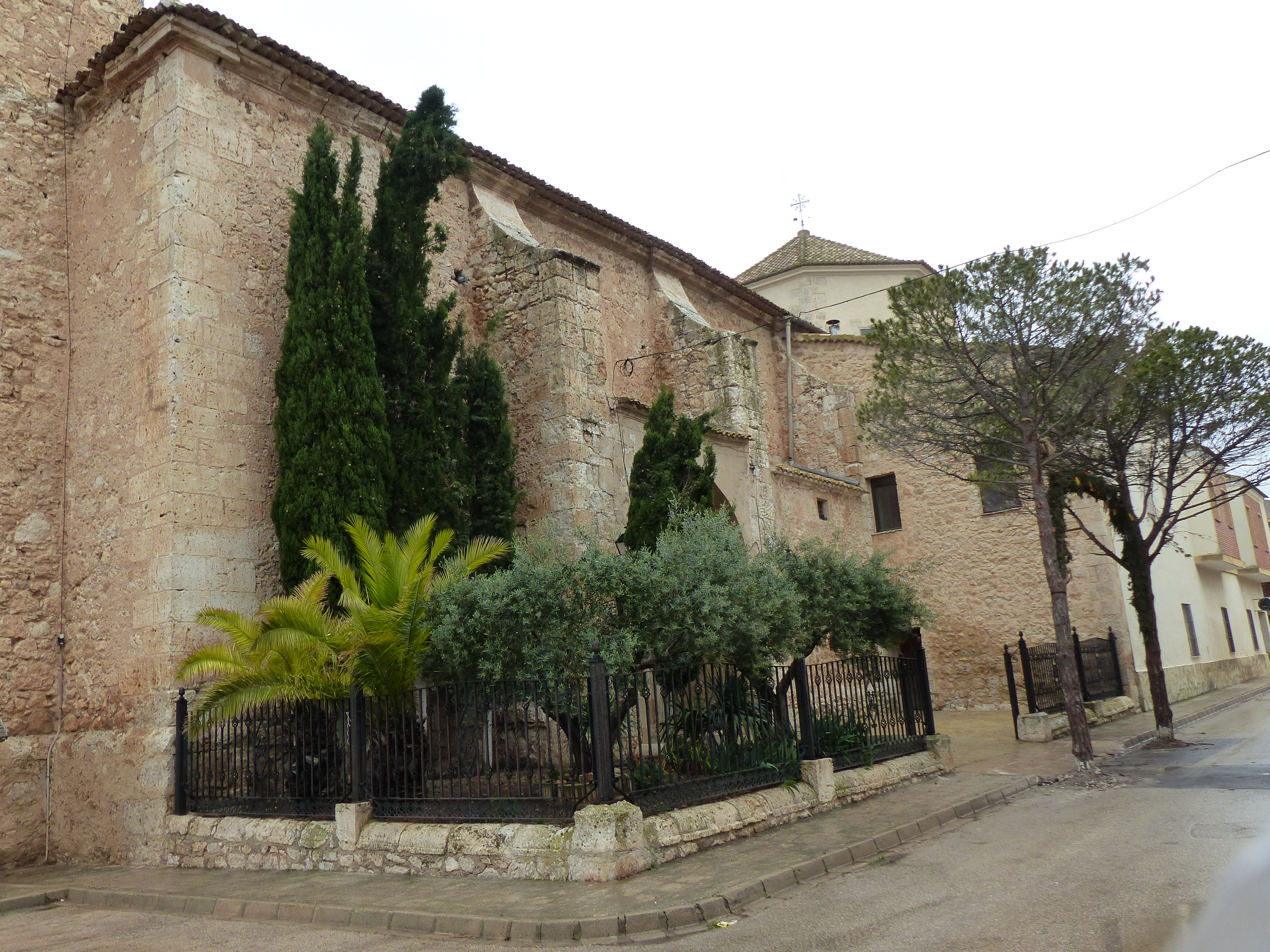 Exterior de la iglesia